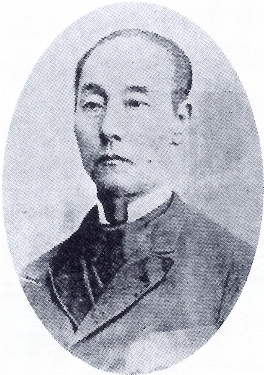 細川興貫の肖像写真。